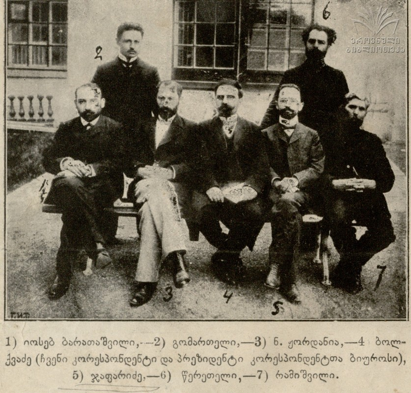 სხედან მარცხნიდან მარჯვნივ: იოსებ ბარათაშვილი, ნოე ჟორდანია, მ.ს. ჯაფარიძე, ისიდორე რამიშვილი; დგანან მარცხნიდან მარჯვნივ: ივანე გომართელი, სემიონ წერეთელი.